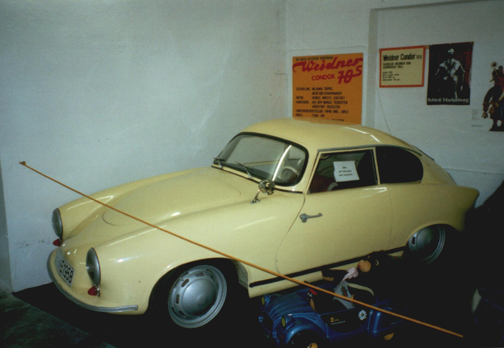 Weidner 1958